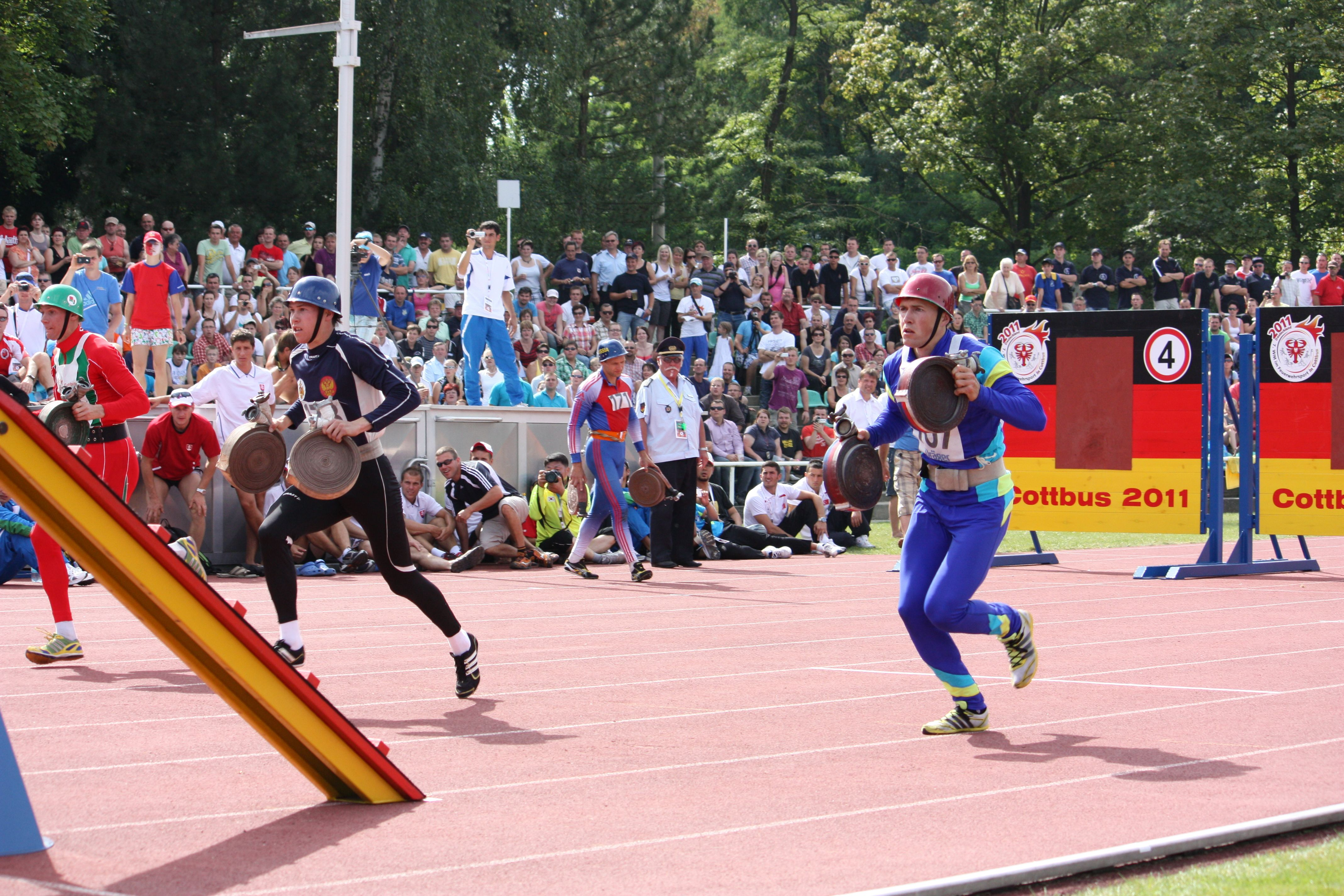 100-Meter-Hindernislauf bei der 7. WM im Feuerwehrsport in Cottbus